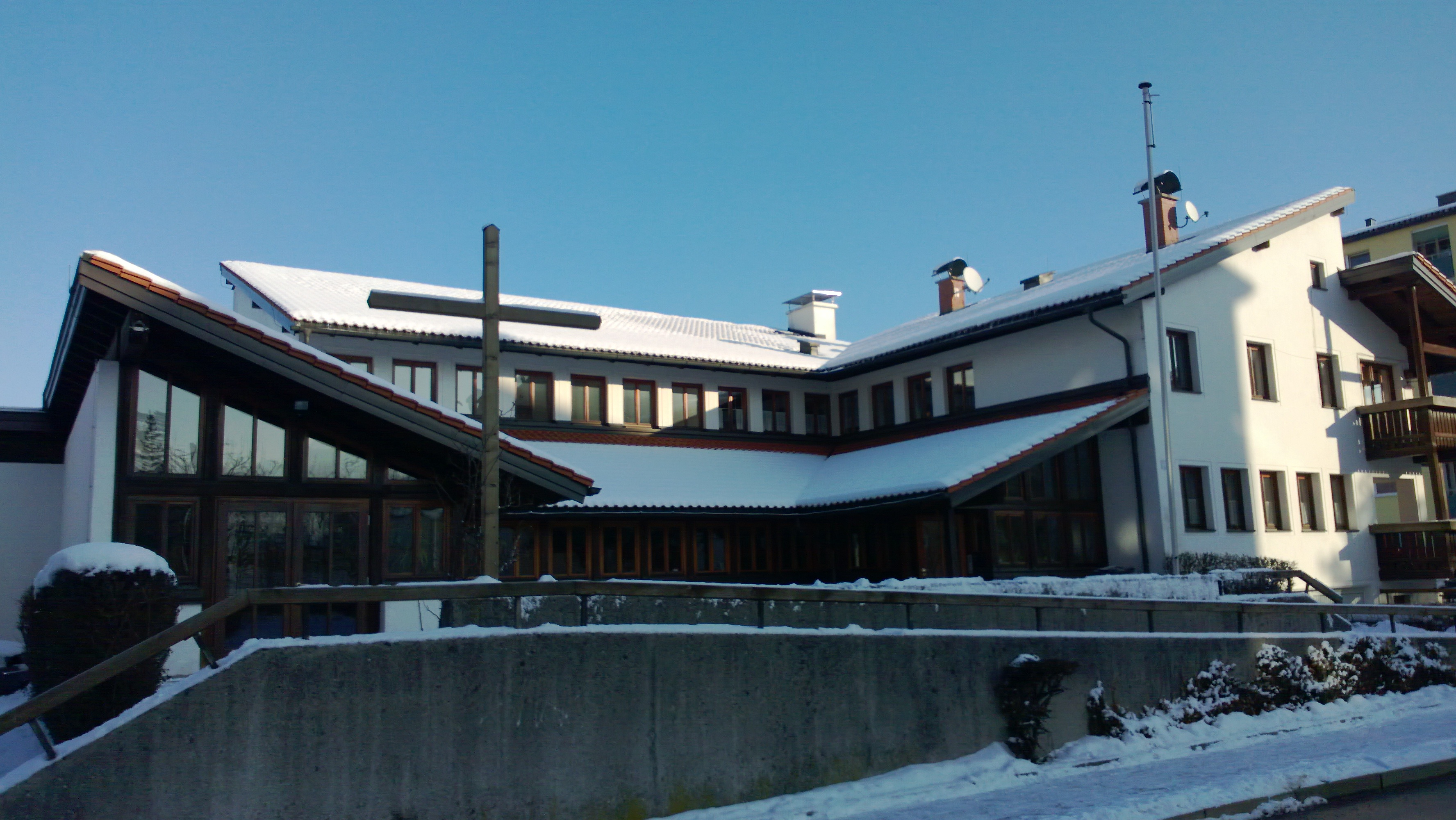 Pfarrzentrum Hallein-Neualm im Stadtteil Neualm der Stadt Hallein